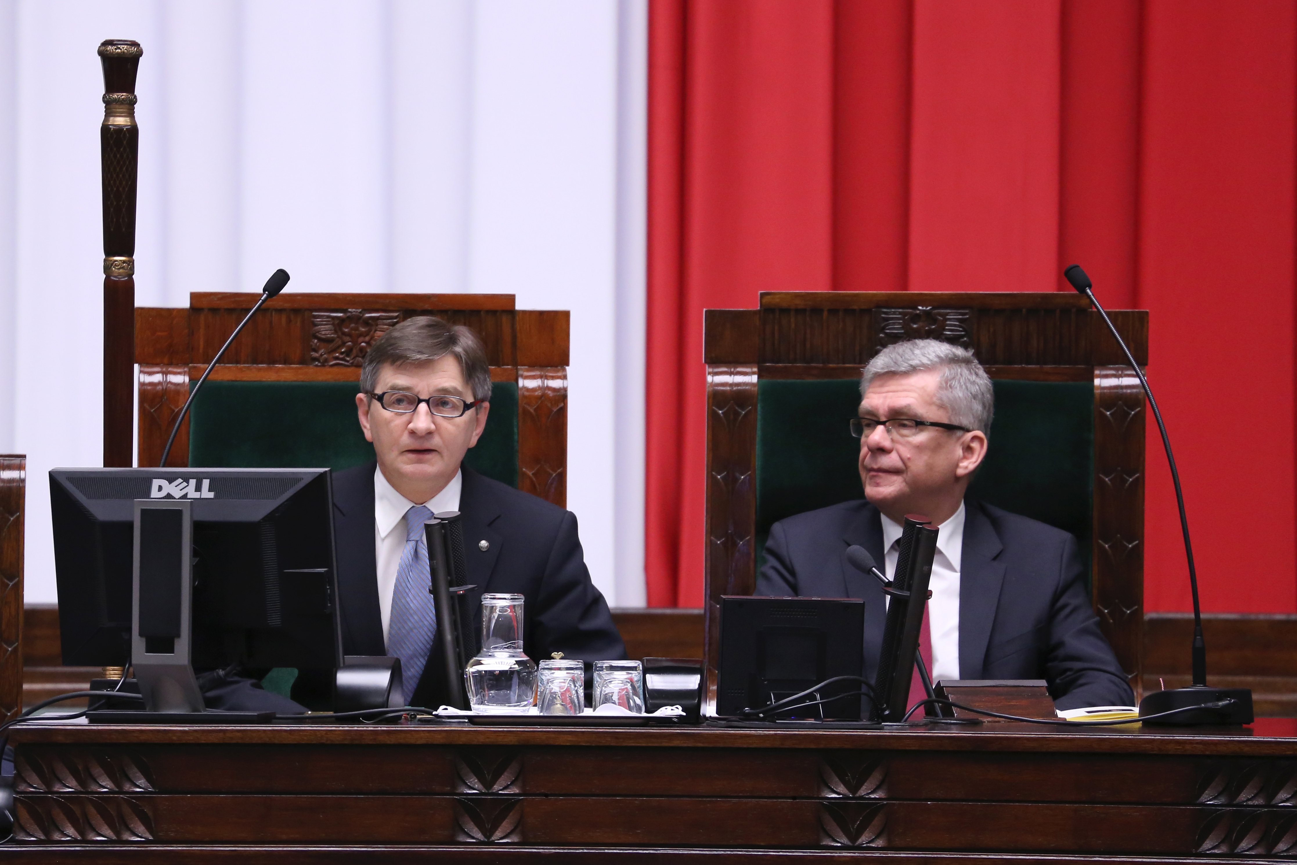 Zgromadzenie posłów i senatorów z okazji 10. rocznicy zaprzysiężenia Lecha Kaczyńskiego na prezydenta